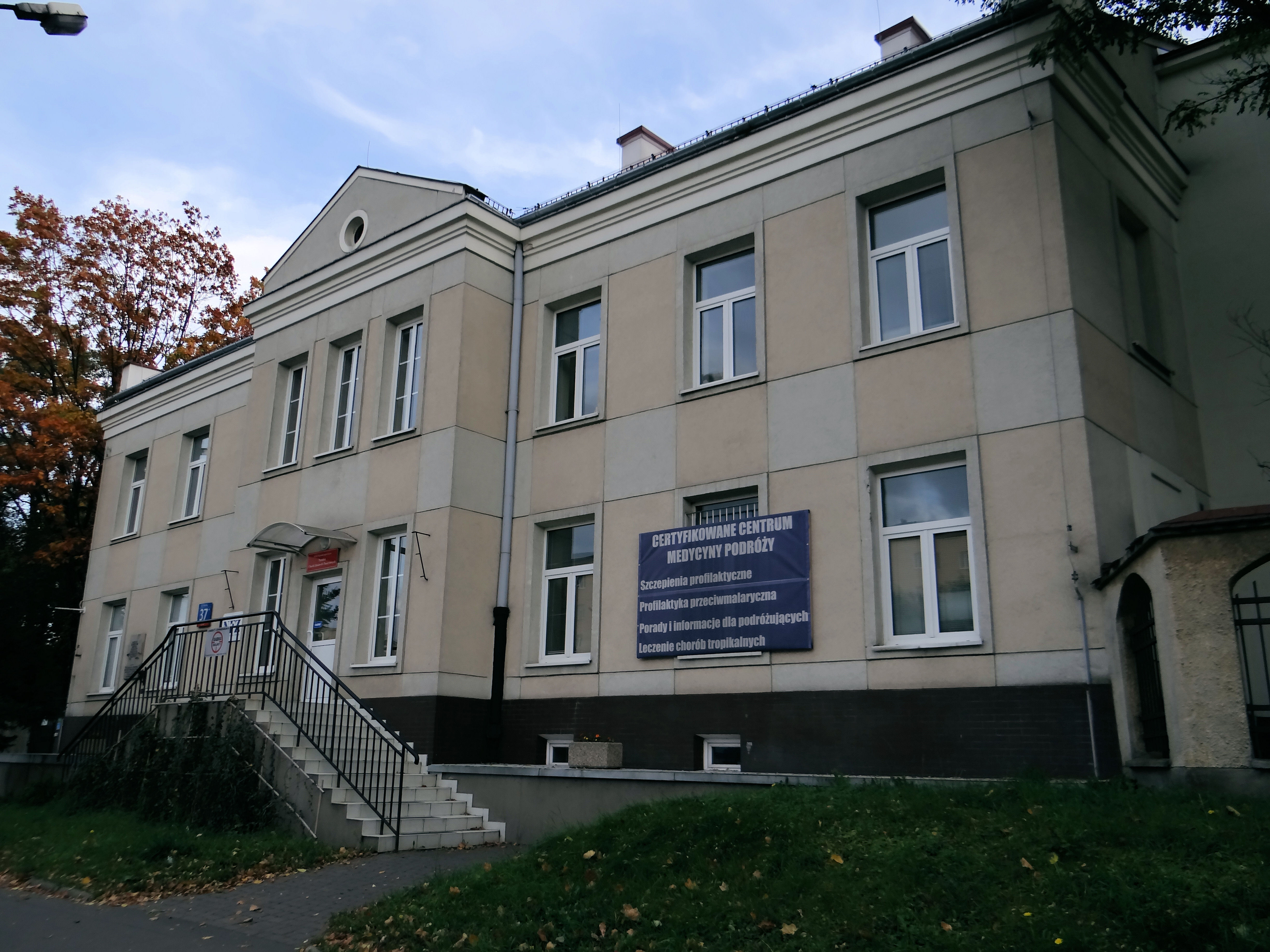 Szpital Zakaźny na Woli - budynek przychodni przyszpitalnej